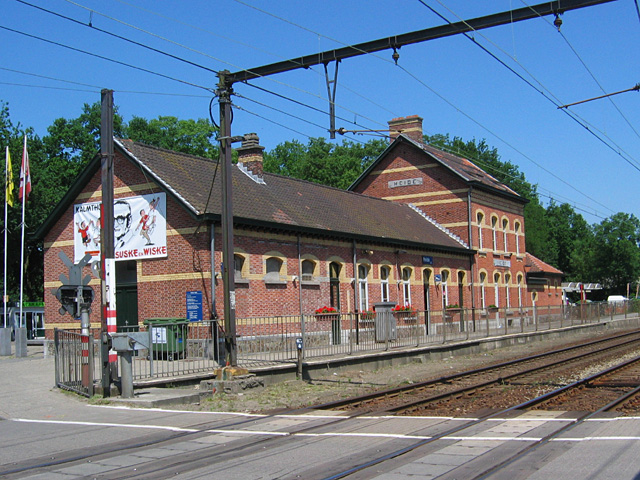 Station van Heide (gemeente Kalmthout) langs spoorlijn 12 (Antwerpen-Essen-Roosendaal)